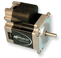 Шаговый двигатель